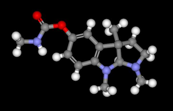 fisostigmina, inhibidor colinérgico de la acetilcolinesterasa/fisostigmine, inhibitor of acetilcolinesterase